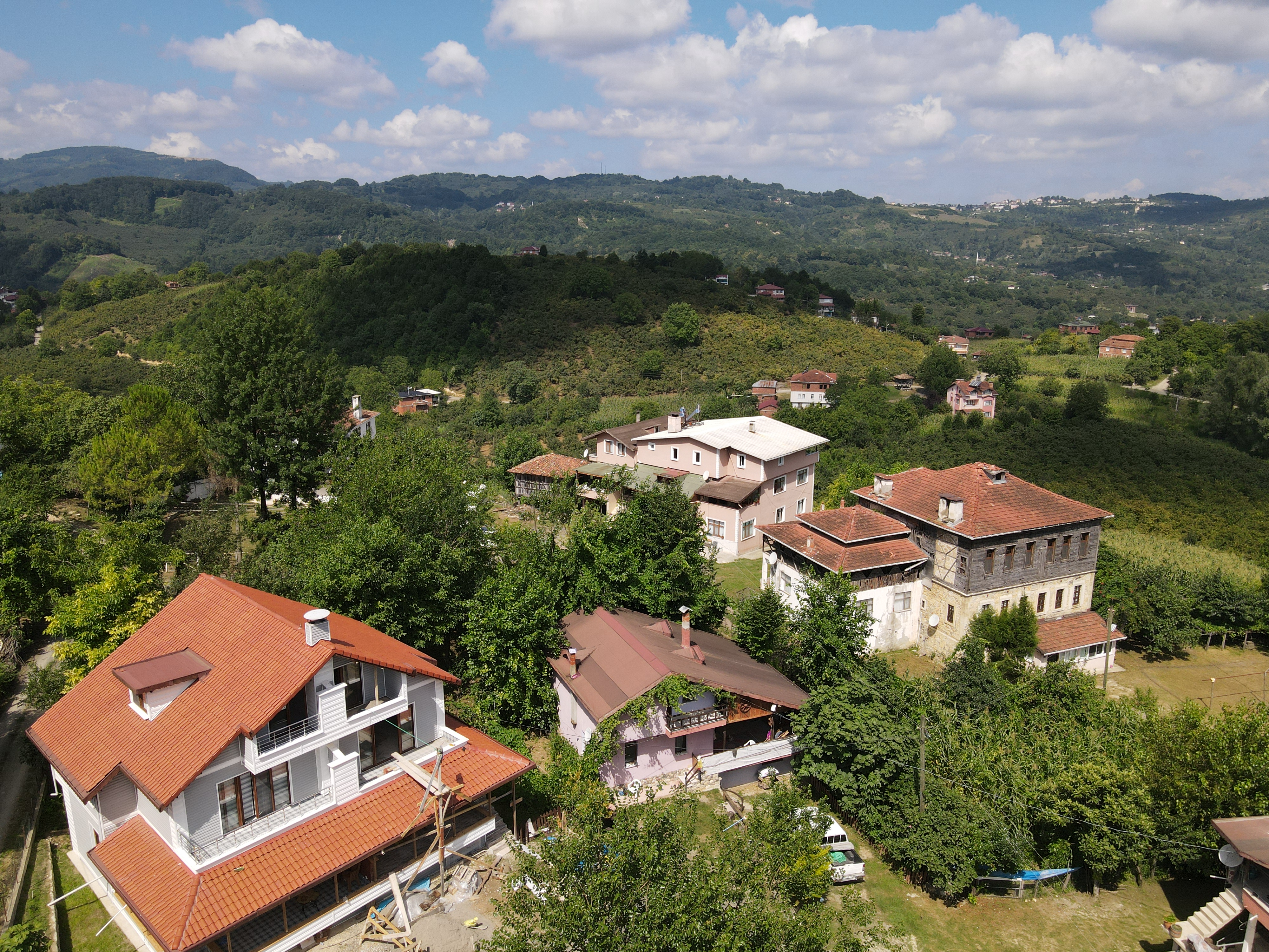 Alivara köyünden bir ayrıntı